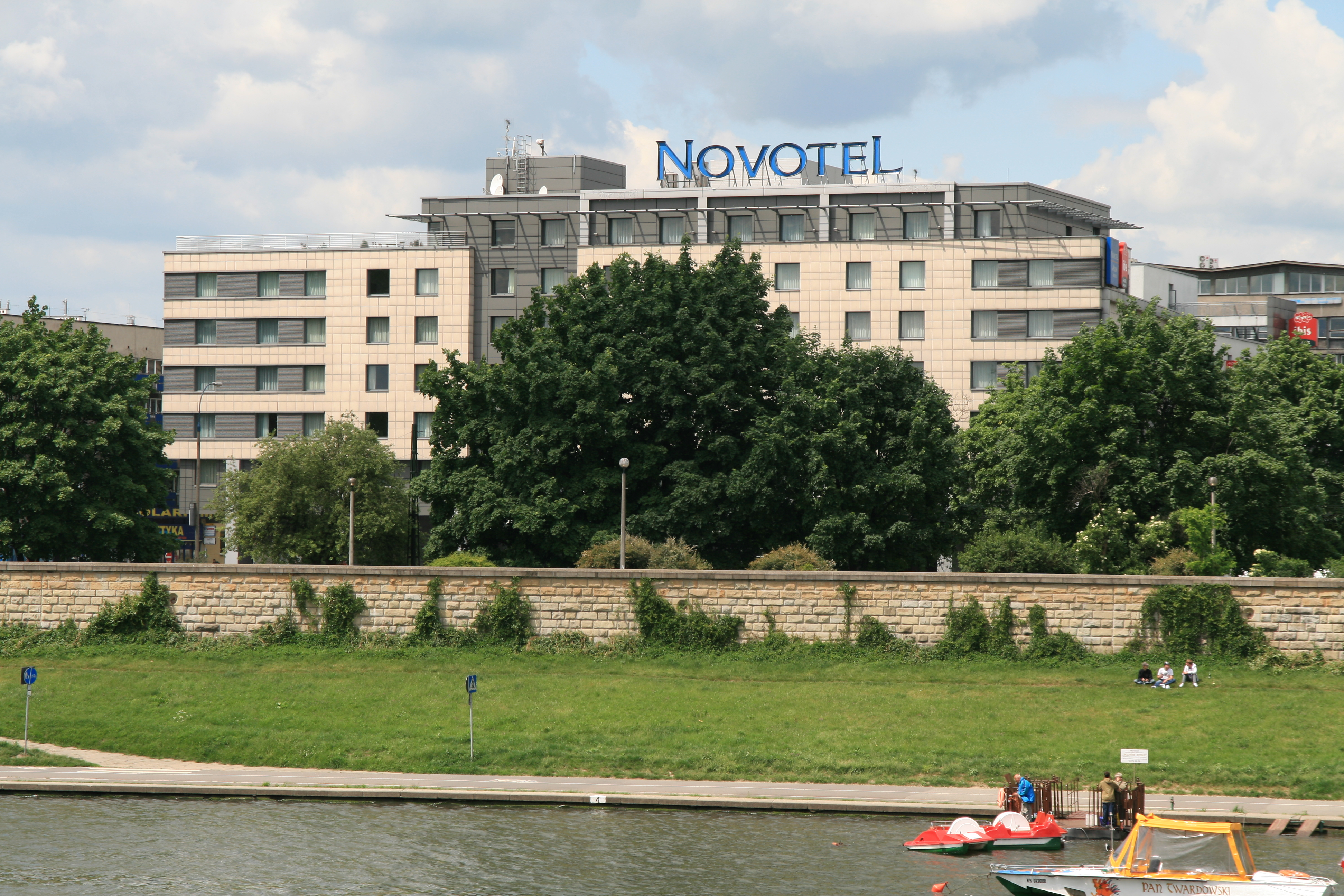 Hotel Novotel w Krakowie